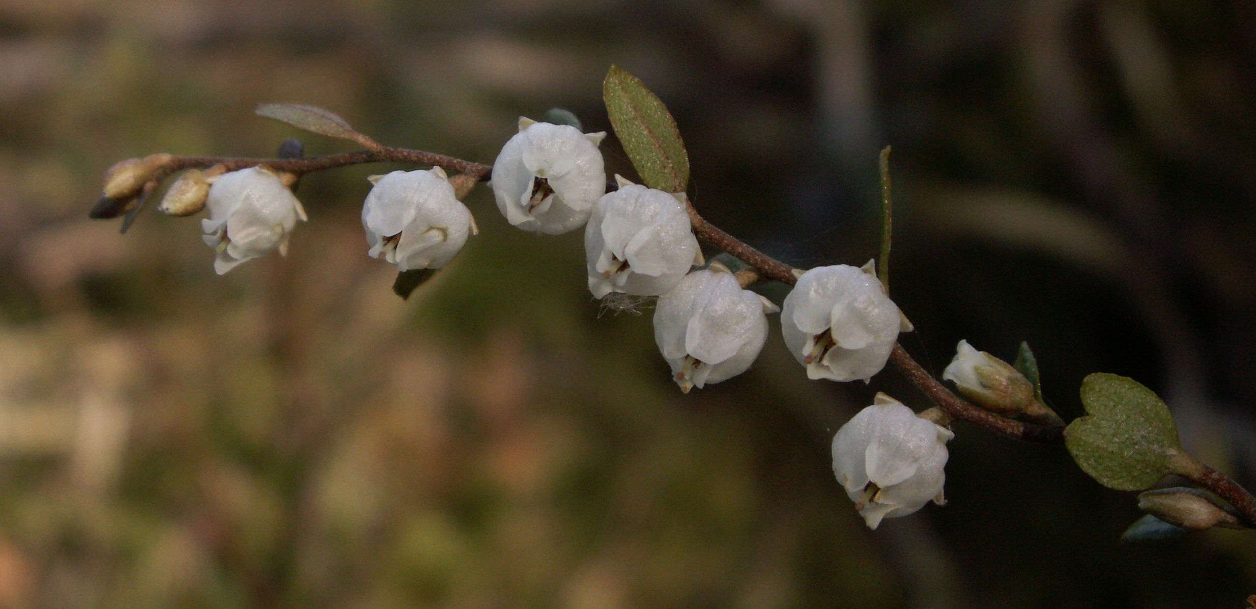 Blueten der Torfgraenke